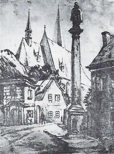 Die sog. Gifthütte, eine Gastwirtschaft hinter der Apollinariskirche in Prag; im Vordergrund die Gedenksäule für Adalbert von Prag von 1677.